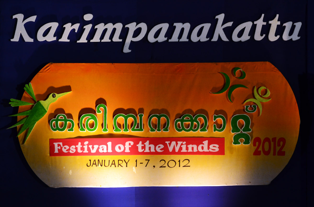 കരിമ്പനക്കാറ്റ്